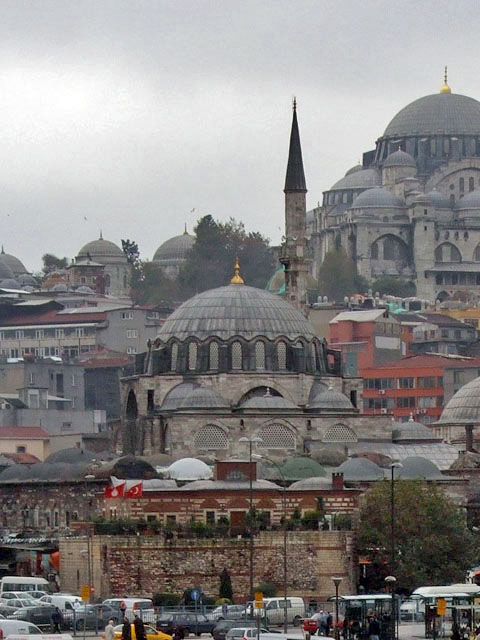 Rustem Pasha Mosque